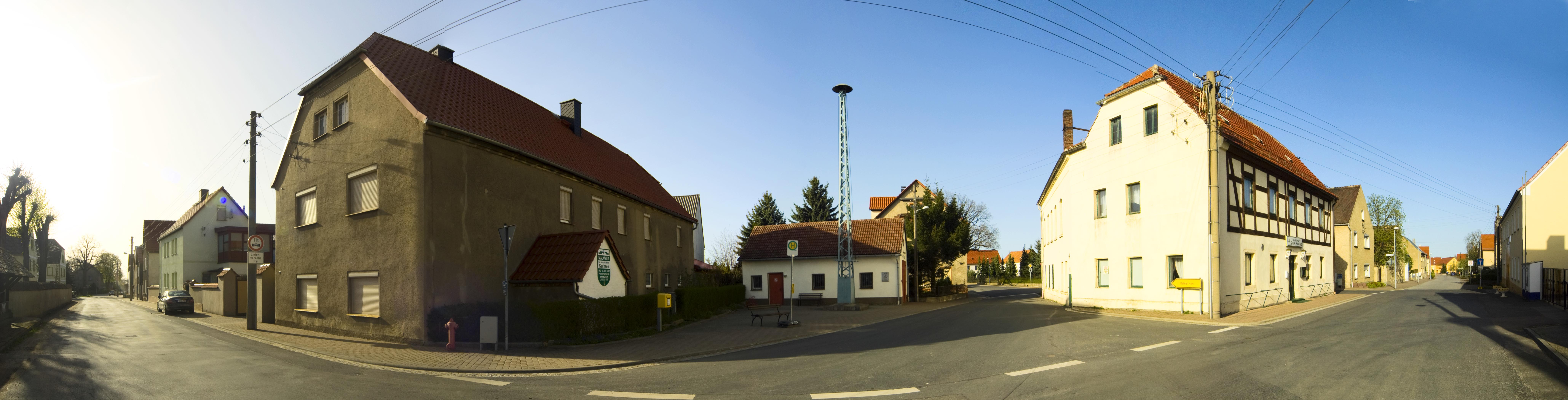 Ortspanorama von Malkwitz aus Sicht der Kirche, Ortsteil von Wermsdorf in Sachsen, Stephan Komp